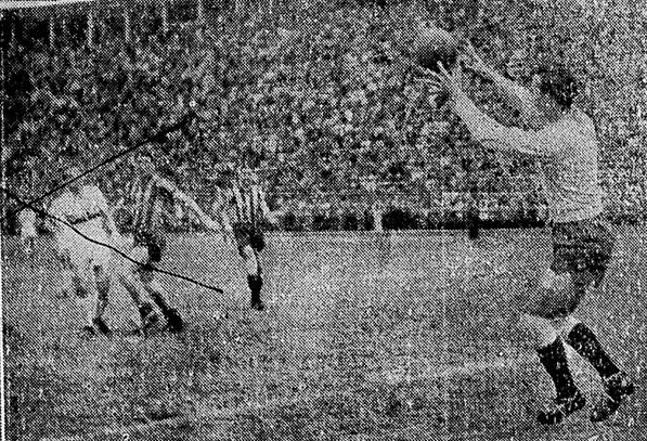 Imagen del partido amistoso disputado entre São Paulo y Rosario Central el 31 de diciembre de 1945, con empate en dos goles. El arquero canalla José Poy detiene un remate rival.